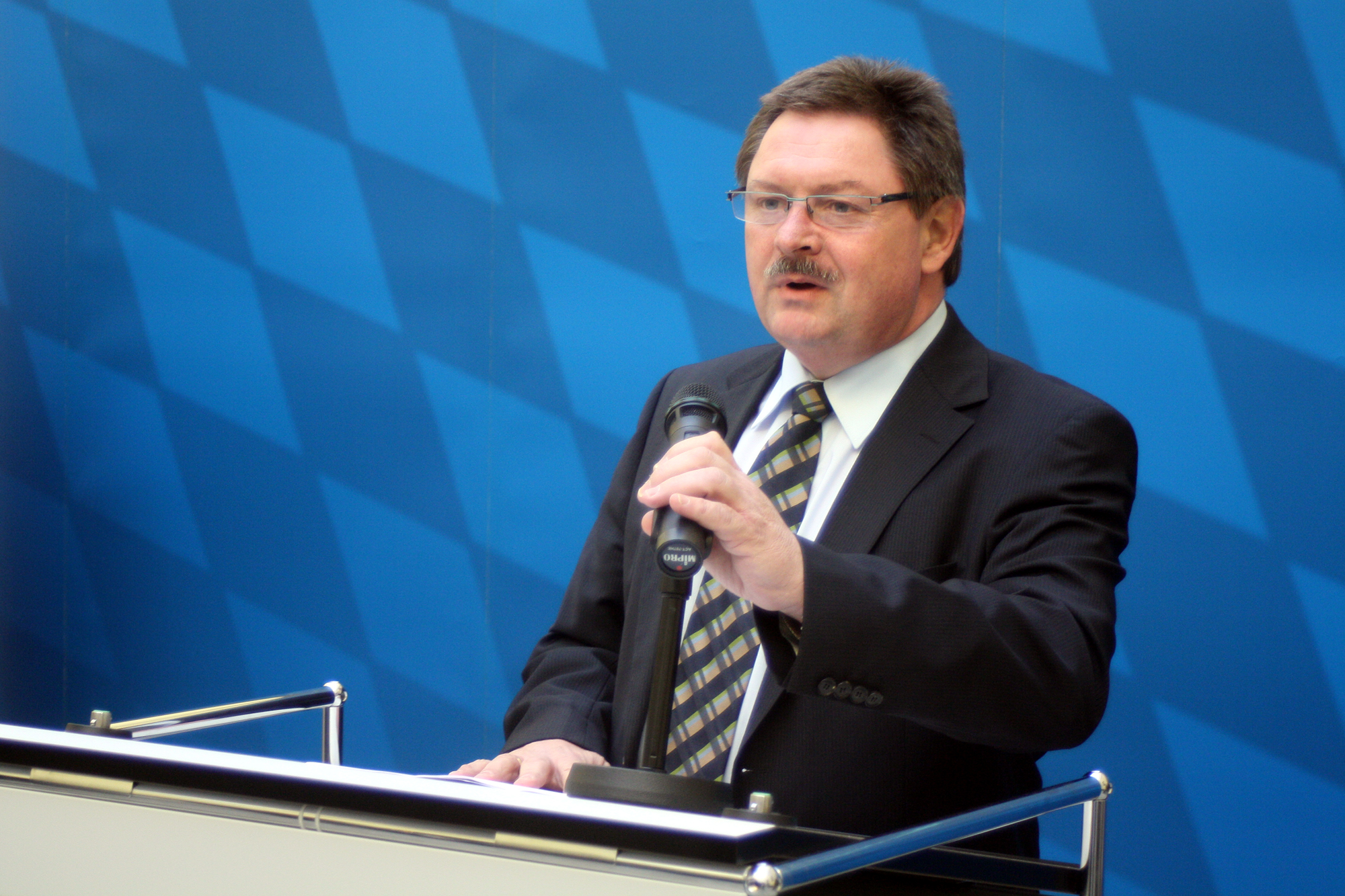 Gerhard Eck, bayerischer Politiker (CSU). Mitglied des Bayerischen Landtags (seit 1998). Seit Oktober 2009 als Staatssekretär im Staatsministerium des Innern Mitglied der Bayerischen Staatsregierung.